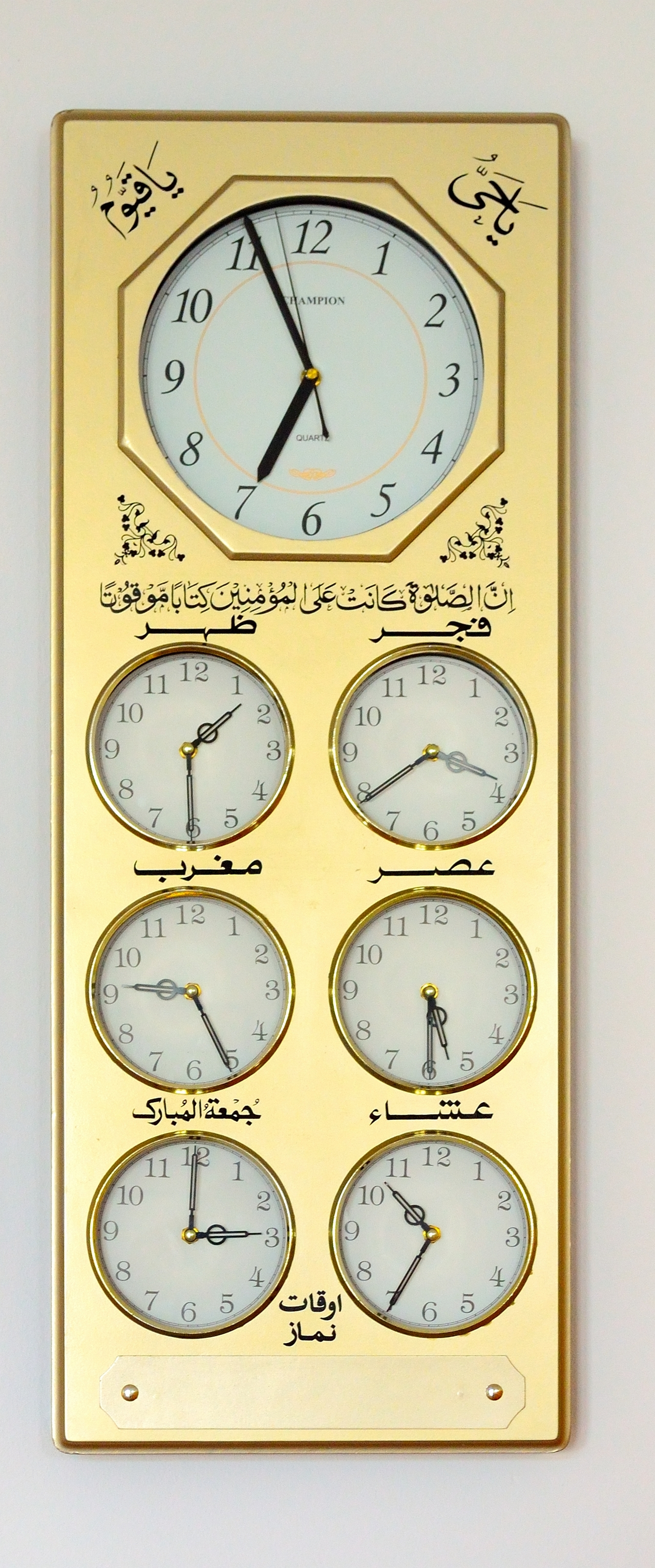 Gebetszeitenanzeige im Eingangsbereich der Khadija-Moschee in Berlin: Fadschr (Gebet vor dem Sonnenaufgang) 3:40 Uhr Ẓuhr (Mittagsgebet) 13:30 Uhr ʿAṣr (Nachmittagsgebet) 17:30 Uhr Maghrib (das Gebet nach dem Sonnenuntergang) 21:25 Uhr ʿIschāʾ (Nachtgebet) 22:35 Uhr Dschumʿa (Freitagsgebet) 15:00 Uhr